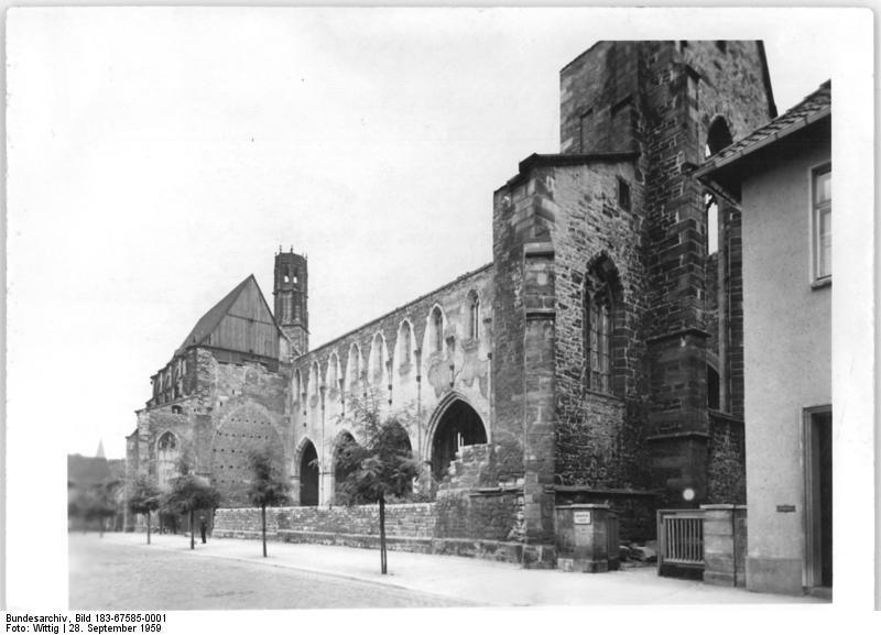 Erfurt, Barfüßerkirche, Ruine Zentralbild Wittig-28.9.59 L- Zum 10. Jahrestag der DDR - Pflege kirchlicher Bauwerke im Bezirk Erfurt mit staatlichen Mitteln. Für die Erhaltung und Erneuerung kirchlicher Bauwerke im Bezirk Erfurt wurden aus staatlichen Mitteln in diesem Jahr rund 178.000 DM zur Verfügung gestellt. UBz: Blick auf die von amerikanischen Bomben stark zerstörte Barfüßerkirche in Erfurt. Für den Wiederaufbau dieser Kirche stellte die Regierung bisher 259.000 DM bereit. Information added by Wikimedia users.Bild ist seitenverkehrt!